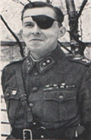 Swedish soldier Gösta Hallberg-Cuula (1912-1942)